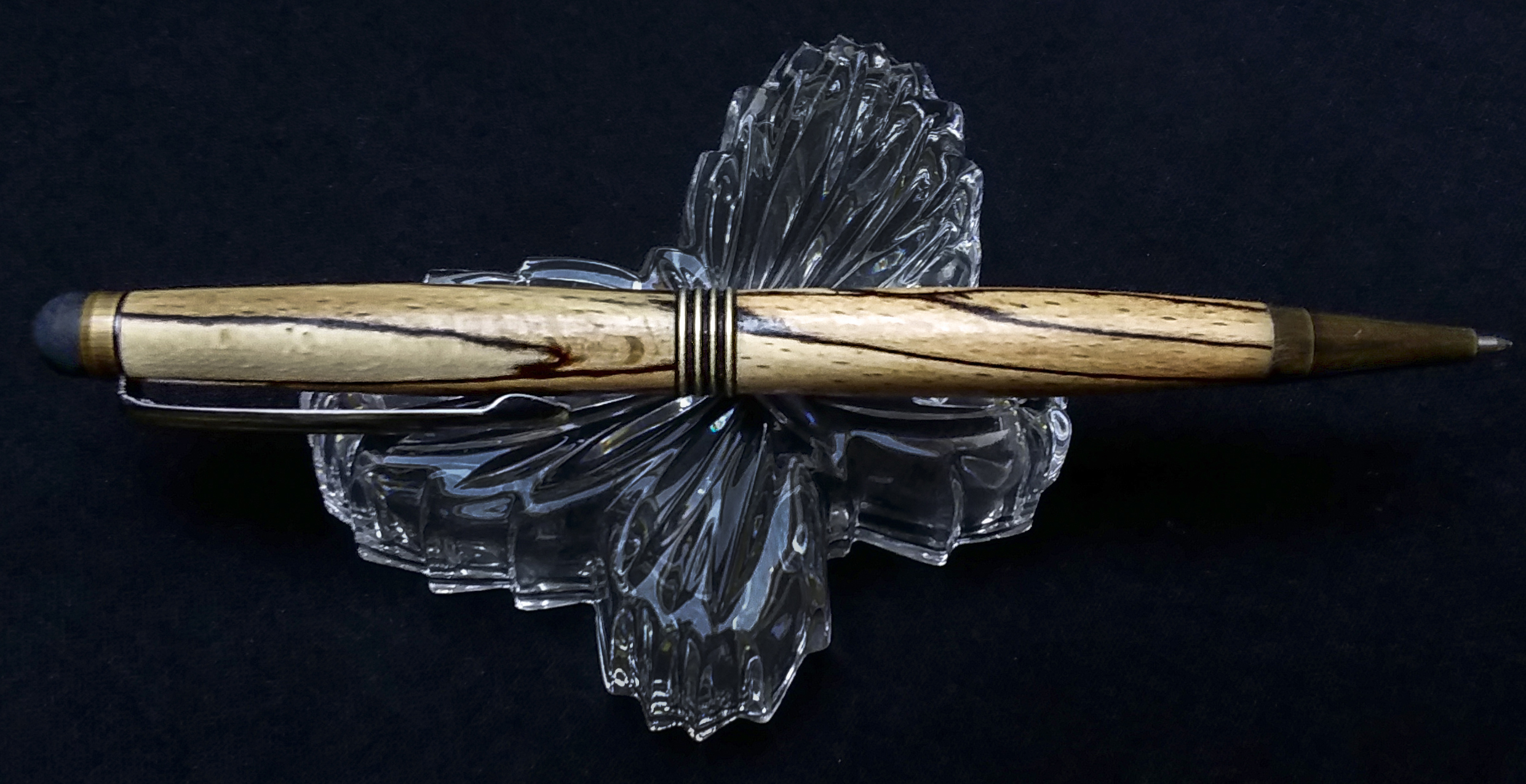 Kugelschreiber aus gestockter Buche mit Silikonkappe für Touchscreens